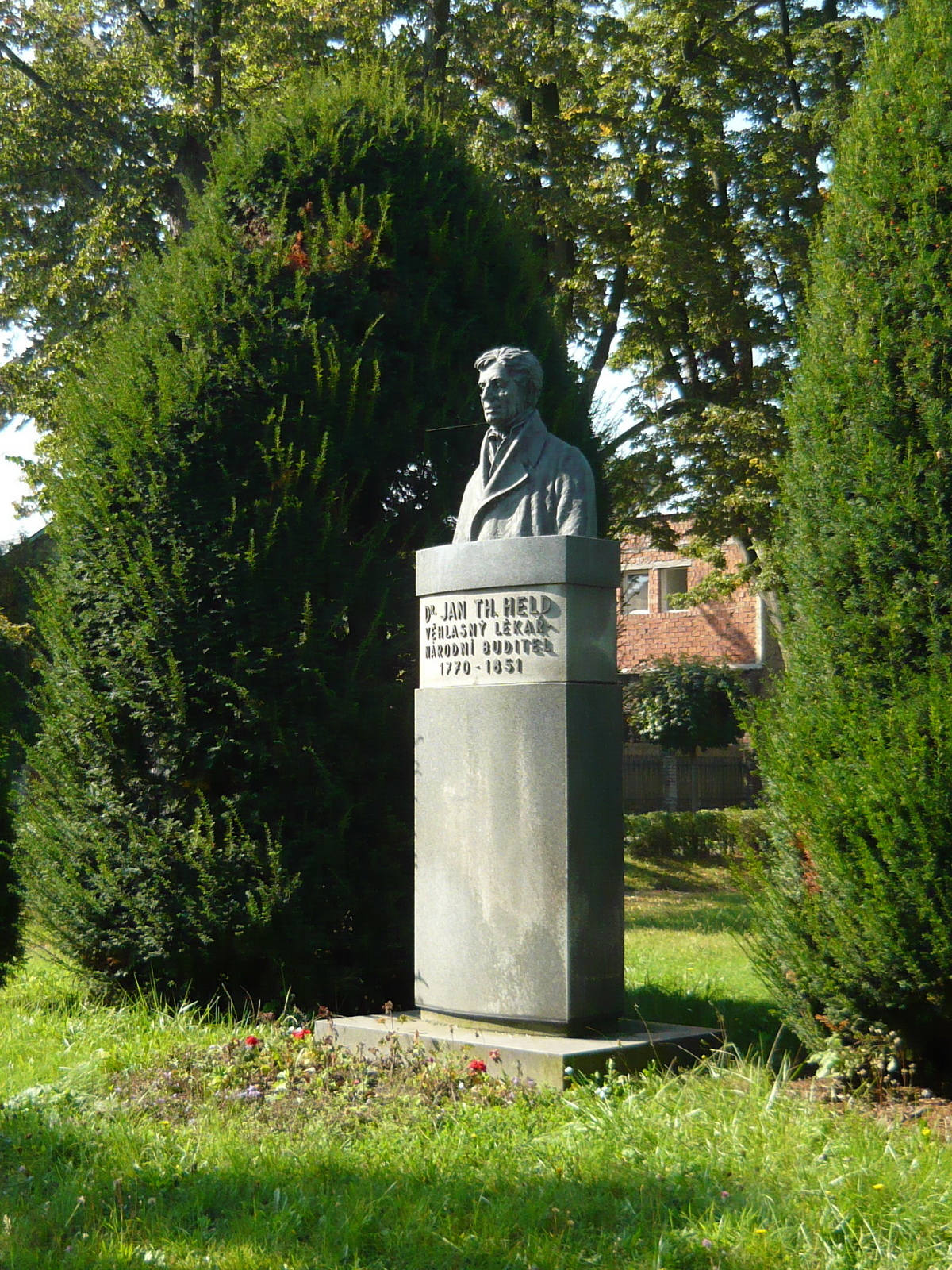 Třebechovice pod Orebem. Pomník Jana Theobalda Helda od sochaře Josefa Škody (1901 - 1949)